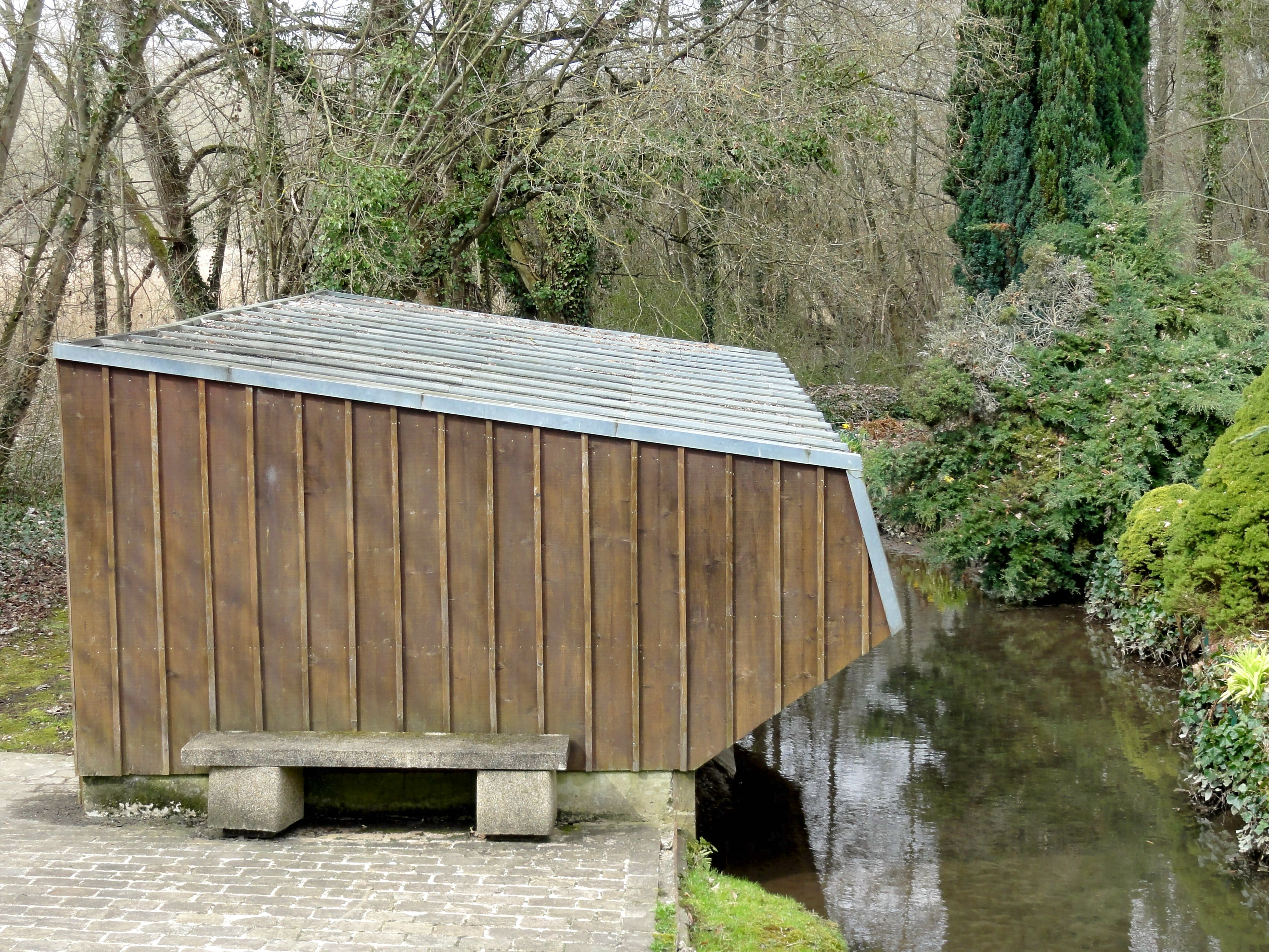 Lavoir sur la Viosne, rue du Moulin, près de la limite de la commune avec Courcelles-sur-Viosne.